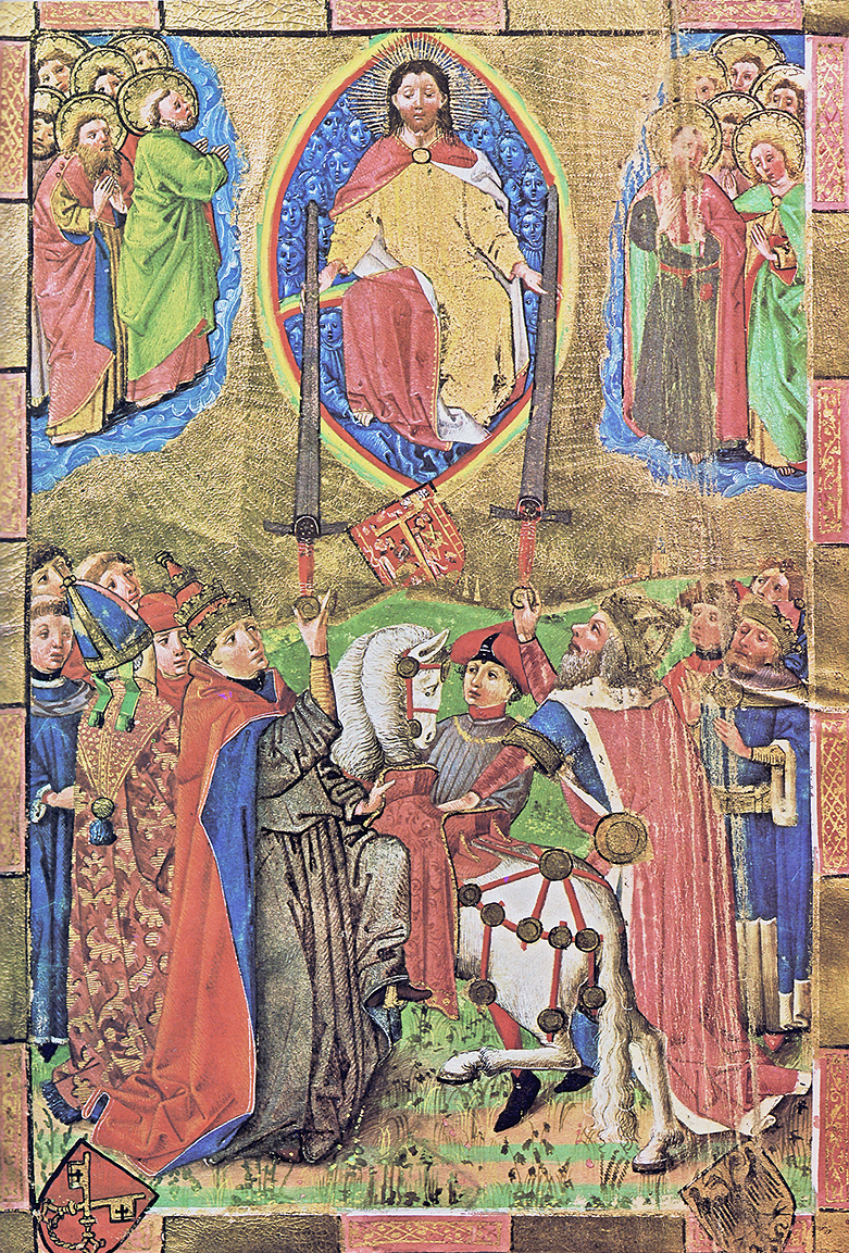 Мініатюра з міської книги Люненбургу Герби Ісуса Христа (по-центр згори), Папи Римського й Імператора Священної Римської імперії (справа знизу)